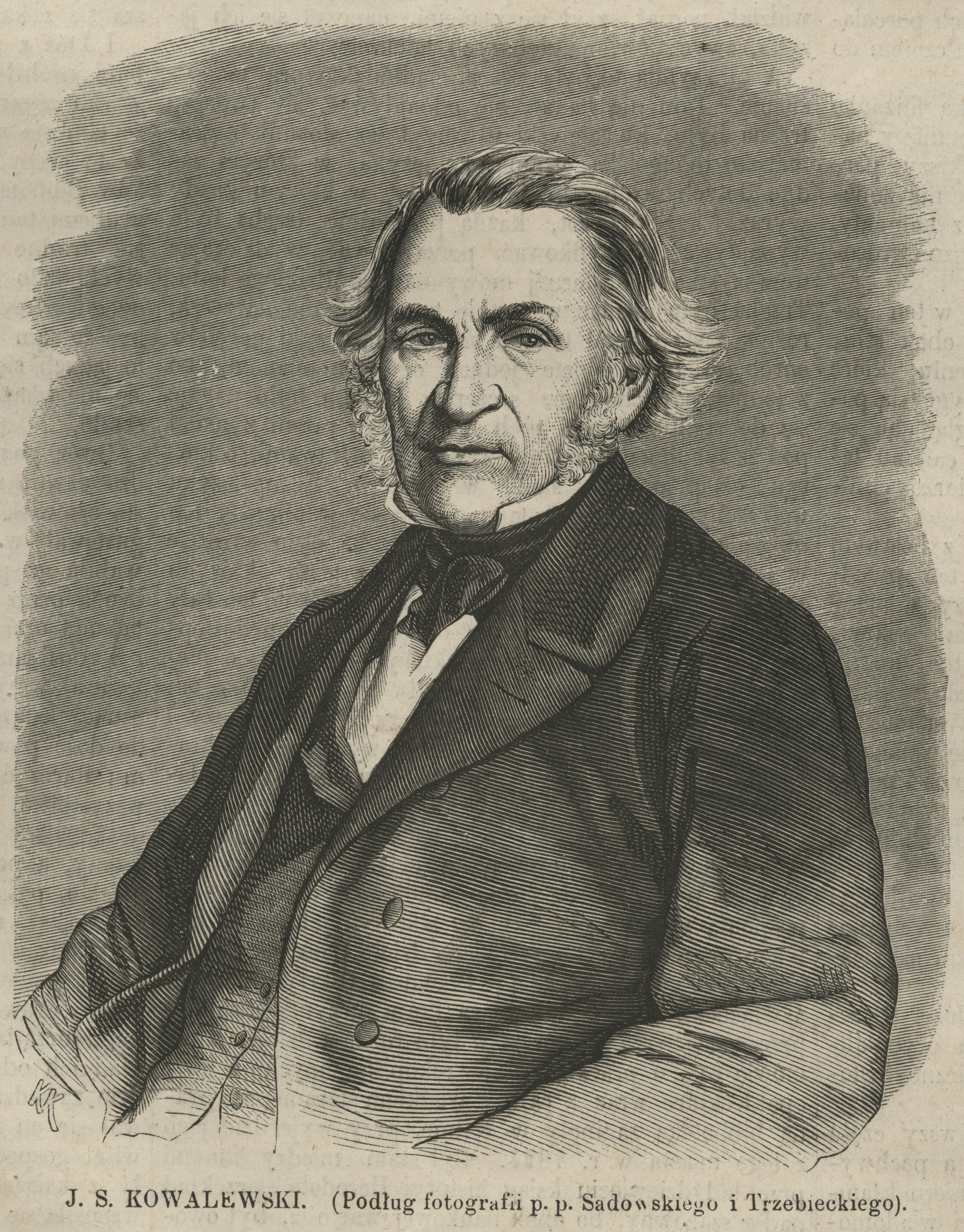 J.[ózef] S.[zczepan] Kowalewski